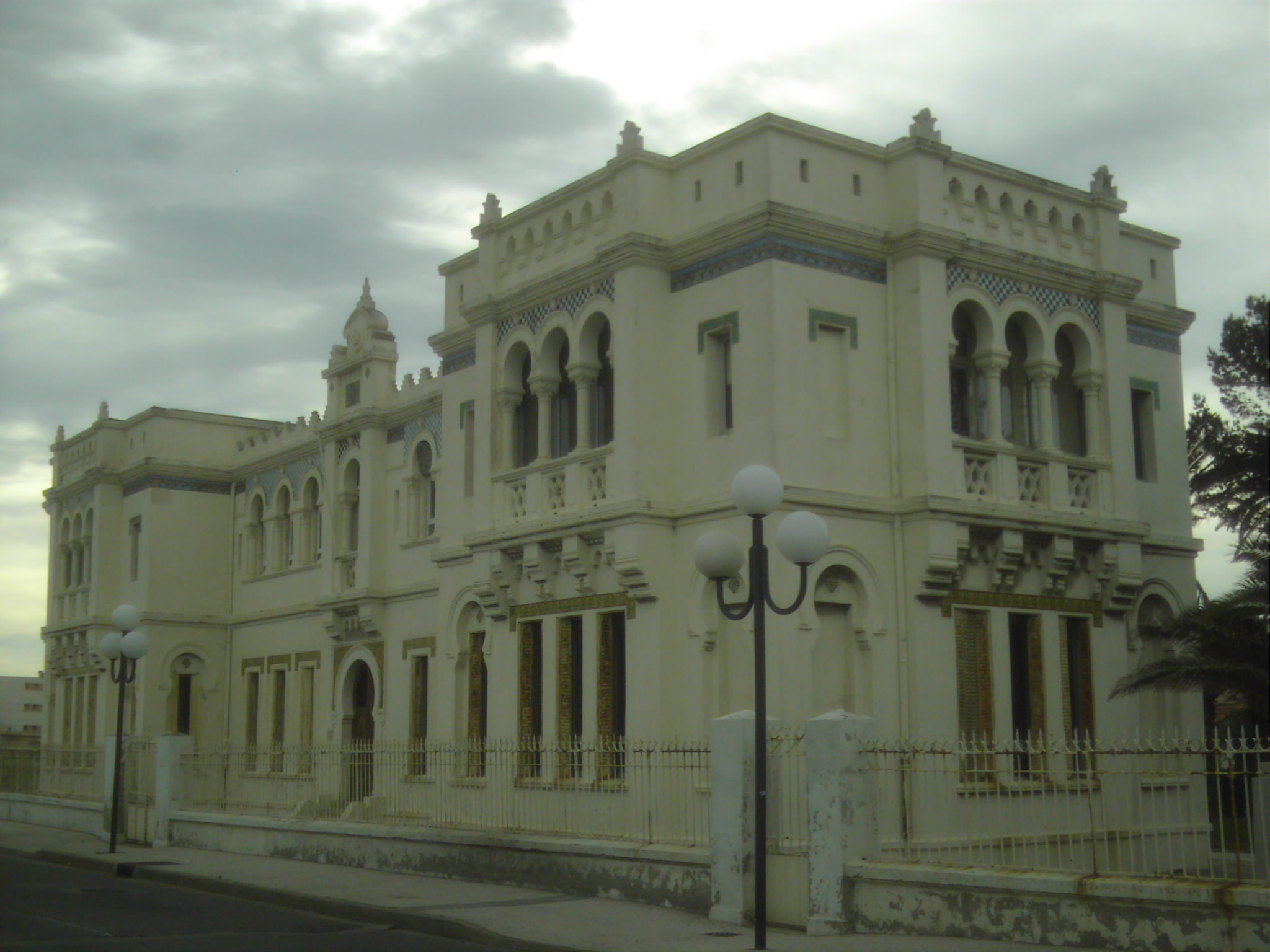 Insititut Michel Pacha La Seyne Sur Mer